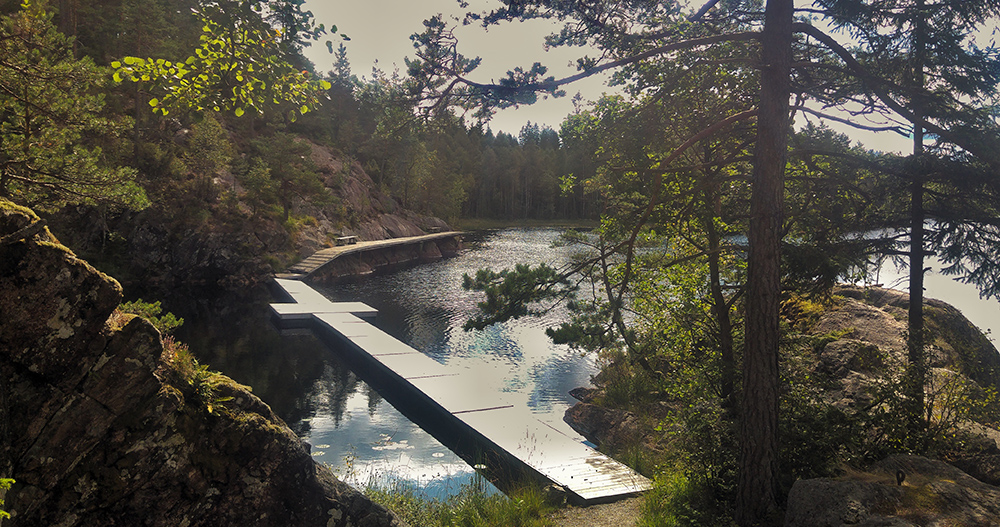 Bilde tatt av Stefan Larsen